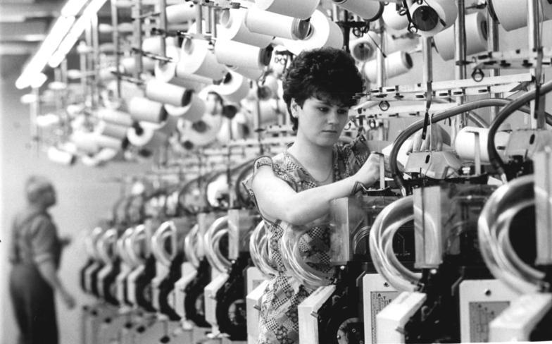 ADN-ZB Thieme 8.5.1989 -Bez. Karl-Marx-Stadt: Die neuesten Kleinrundstrickautomaten aus der CSSR werden im Werk Auerbach des Strumpfkombinats ESDA genutzt. Sie zeichnen sich durch hohe Produktivität und geringen Energieverbrauch aus. Sylvia Fischer betreut 30 dieser modernen Maschinen. Das DDR-Kombinat pflegt seit mehr als drei Jahrzehnten enge Partnerschaftsbeziehungen mit dem tschechoslowakischen Kombinat Elitex Trebic. Bei ESDA arbeiten insgesamt rund 7 000 Kleinrundstrickmaschinen aus der CSSR.